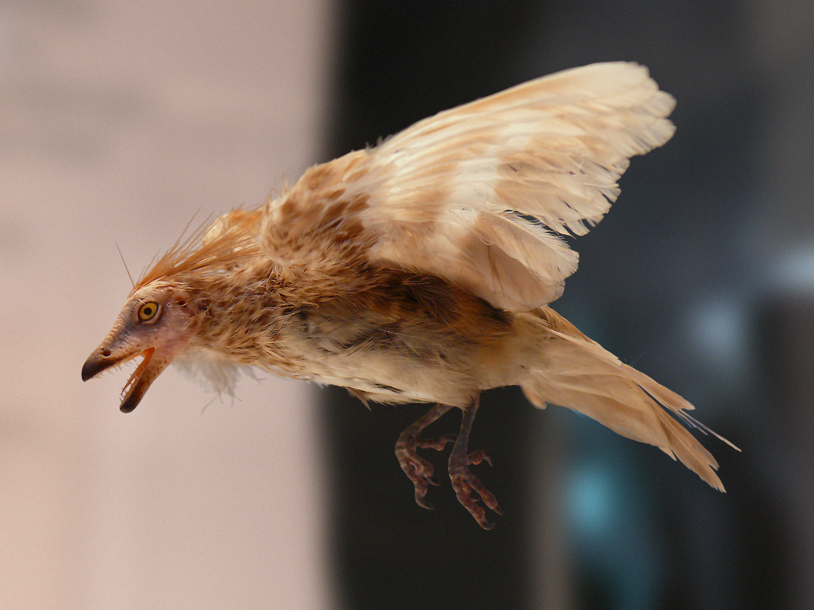 Reconstrucción de un Iberomesornis expuesto en el Museo Nacional de Ciencias Naturales de Madrid